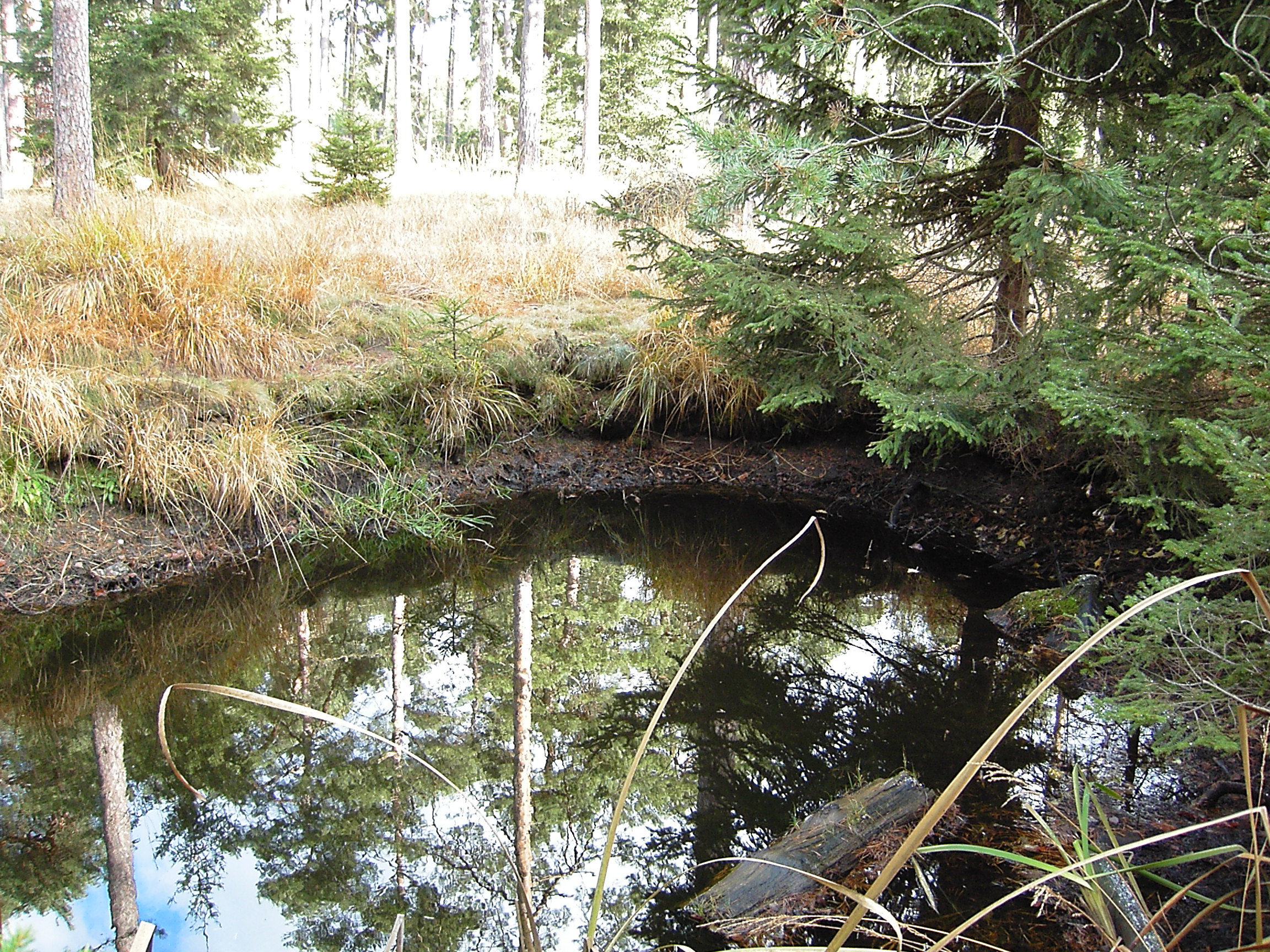 Pohled na PR Ranská jezírka